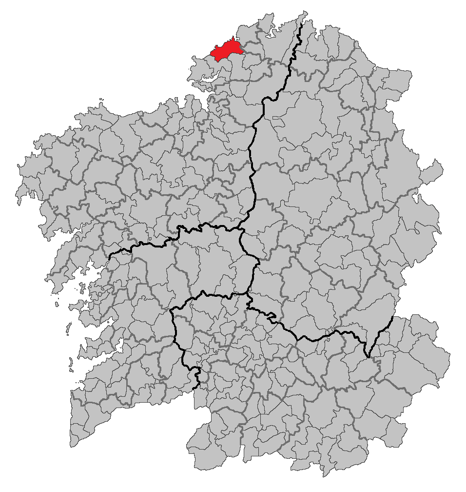 Mapa coa localización do concello de Valdoviño.